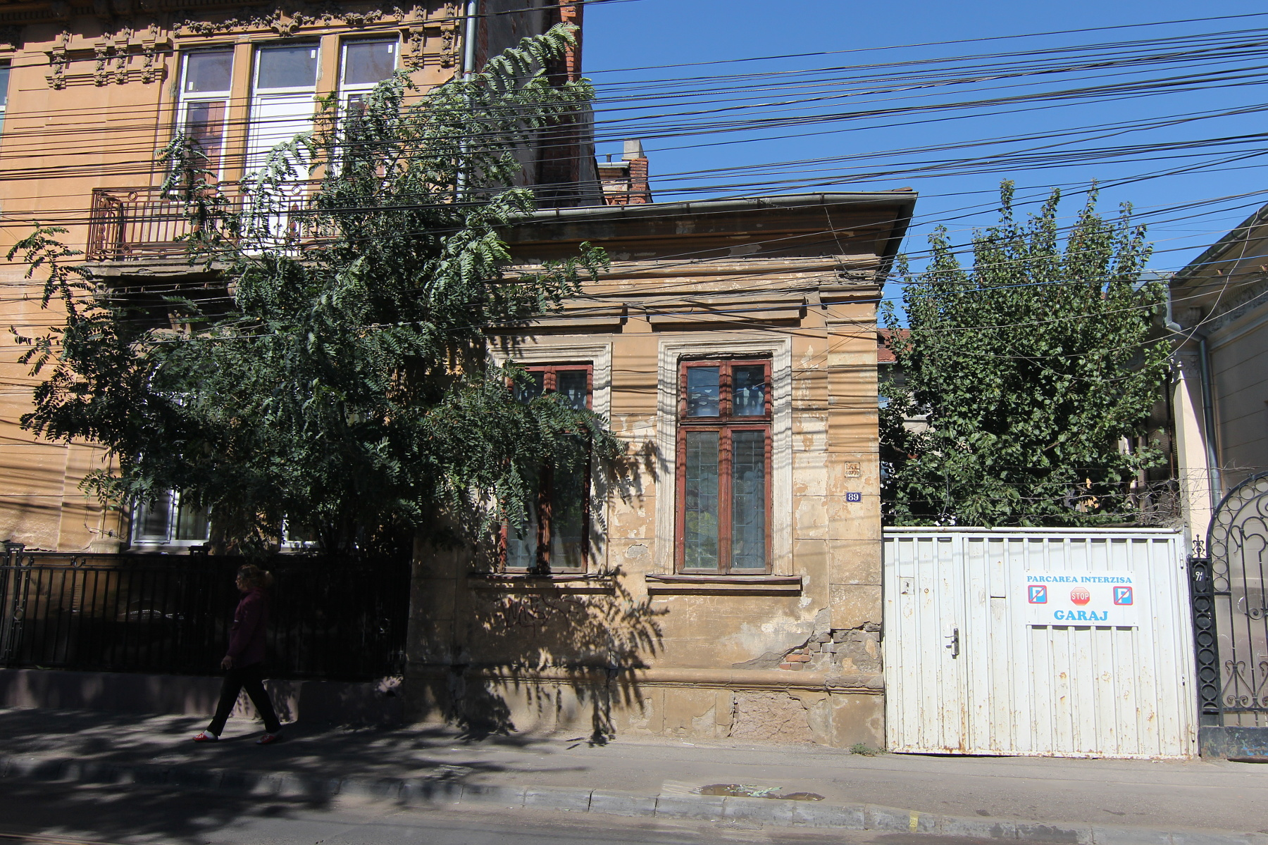 Casă pe Calea Călărașilor